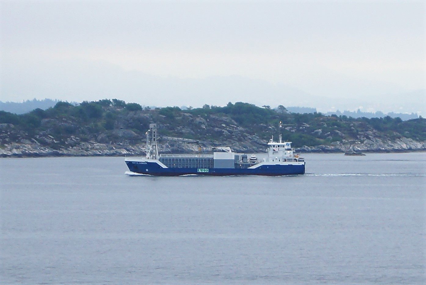 «Artic Junior» i Korsfjorden